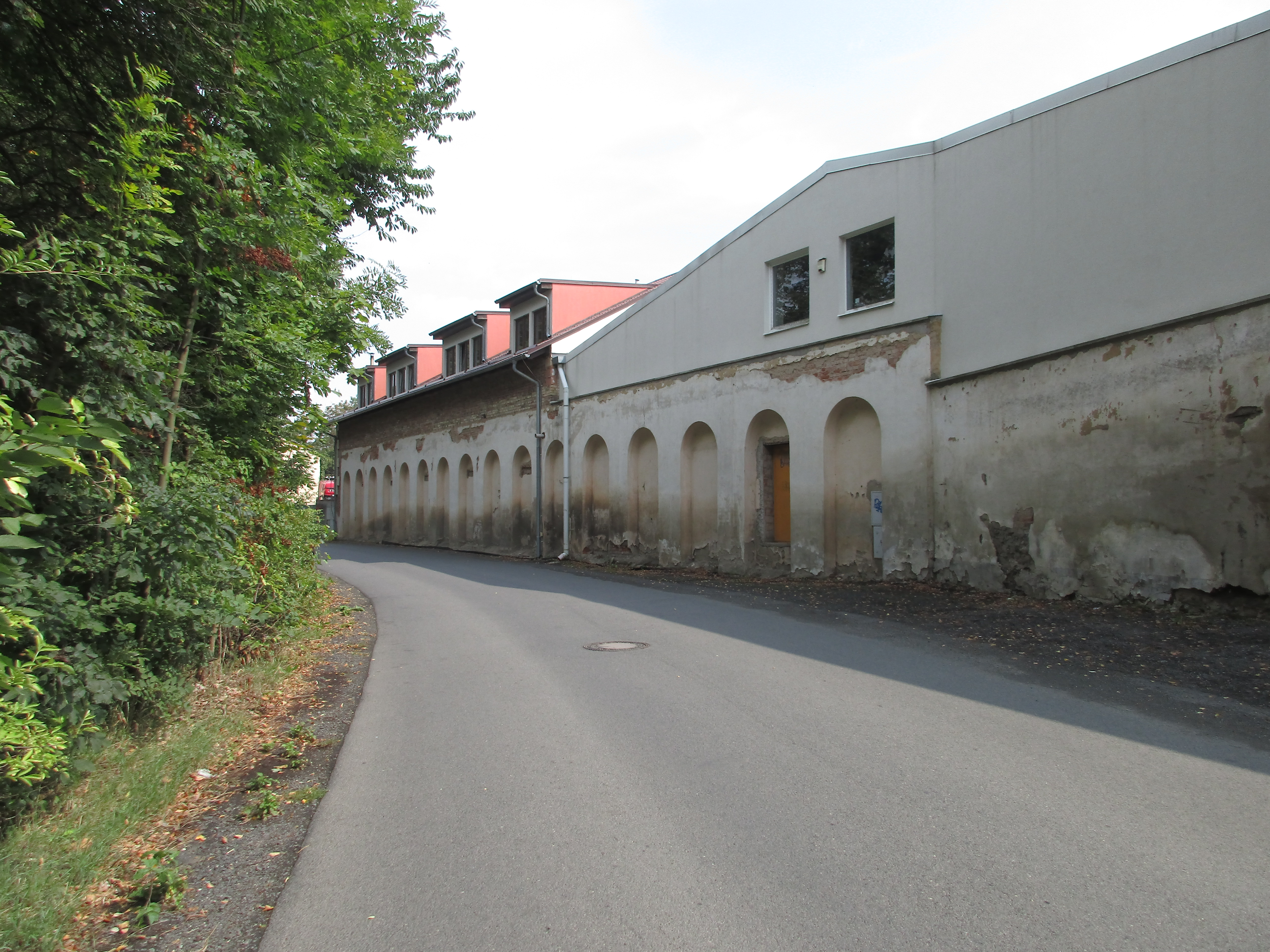 Cukrovar Úvaly.